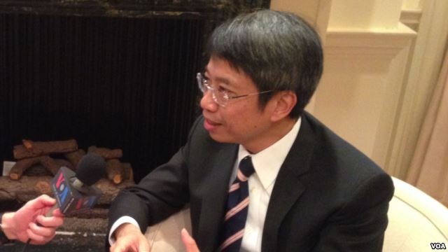 中文（香港）: 香港駐美國總經濟貿易專員梁卓文接受美國之音訪問